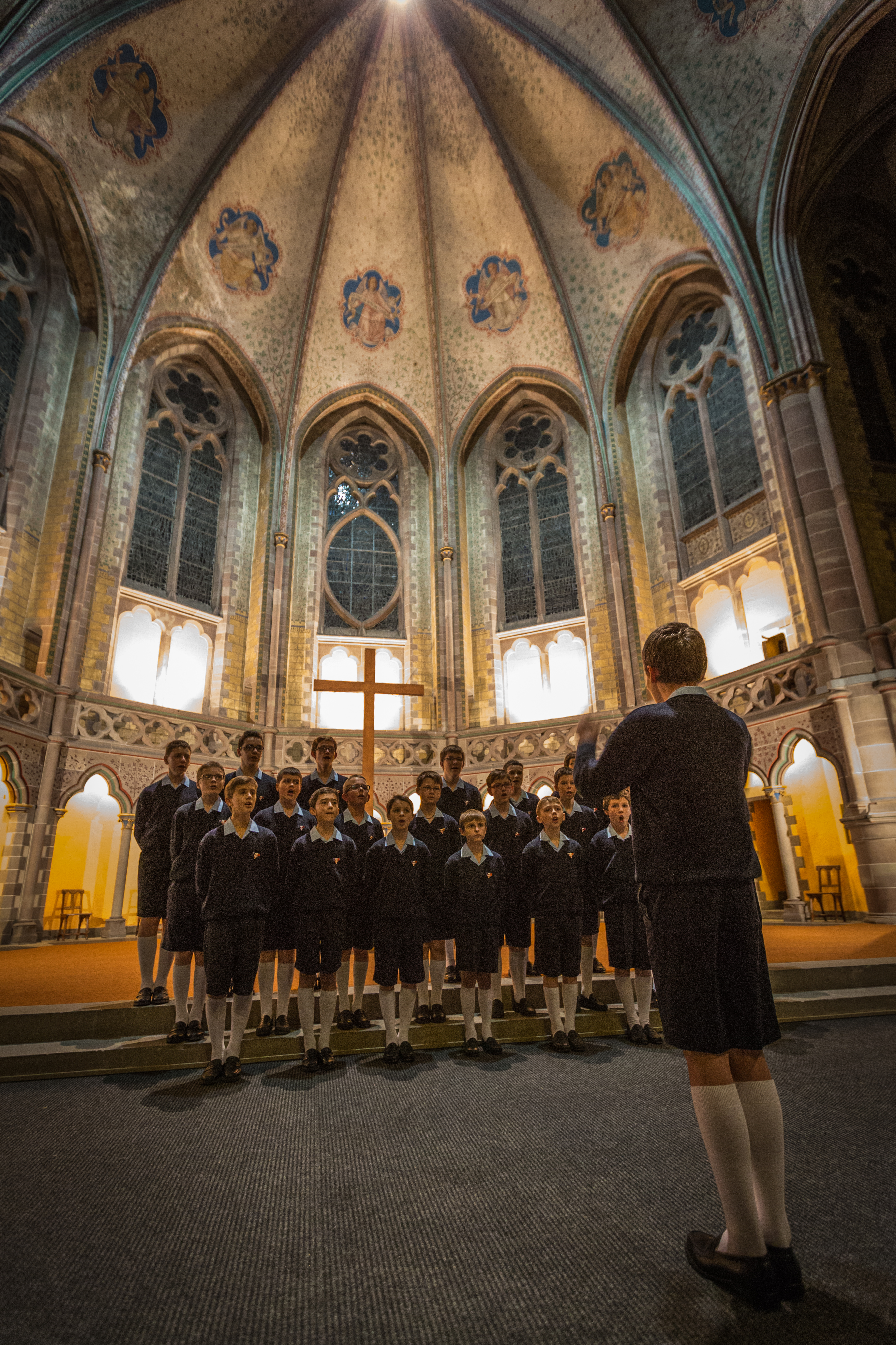 La Manécanterie des Petits Chanteurs à la Croix de Bois en concert à l’église Saint-Paul de Strasbourg pour un concert organisé par la l’Ordre international des Anysetiers, chapitre de Strasbourg, au profit de l’association Semeurs d’Étoiles' le 9 novembre 2013.